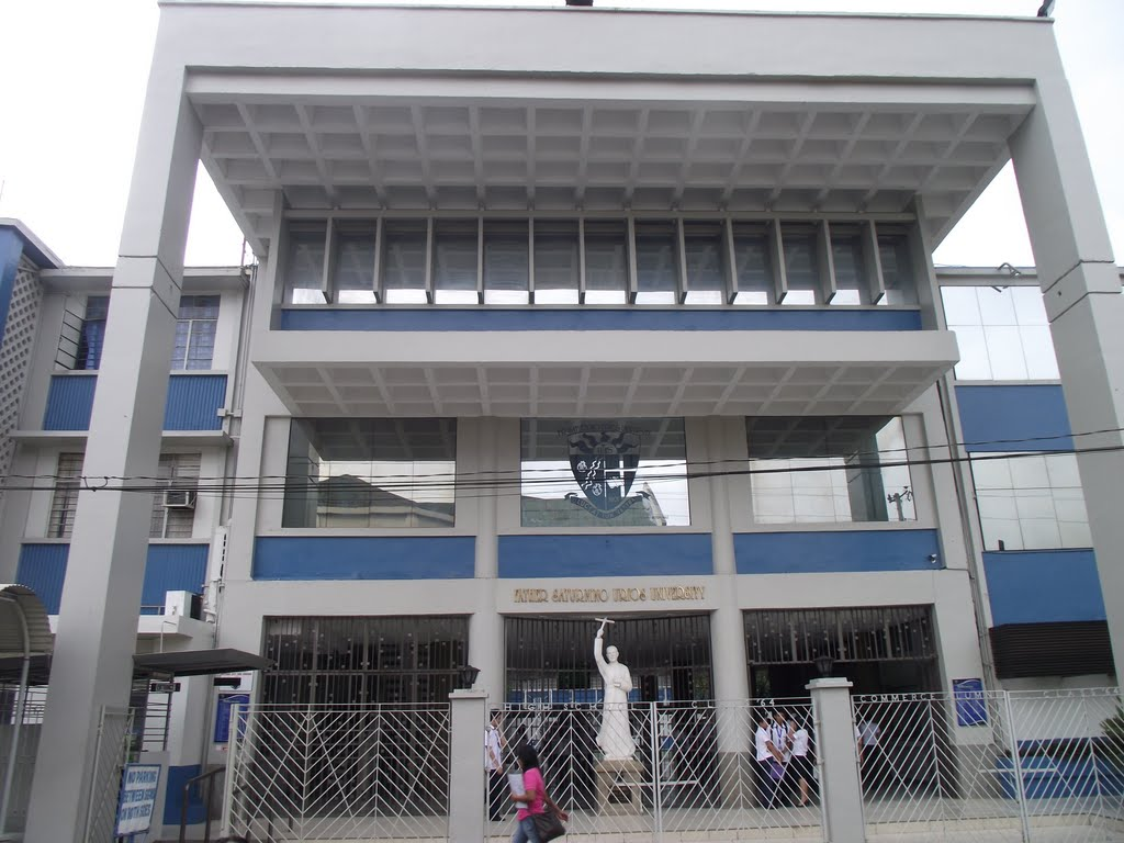 Urios Main